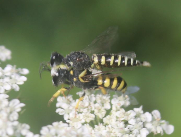 Wespenpaar Lestica clypeata am 25.7.2014 in der Schwetzinger Hardt